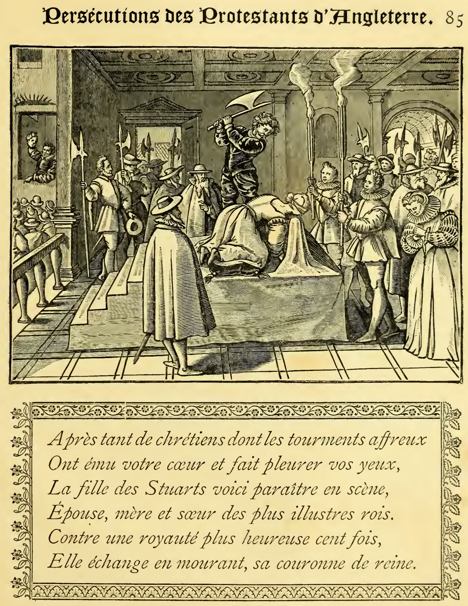 Persécutions des protestants d'Angleterre : Après tant de chrétiens dont les tourments affreux Ont ému votre coeur et fait pleurer vos yeux, La fille des Stuarts voici paraître en scène, Épouse, mère et soeur des plus illustres rois. Contre une royauté plus heureuse cent fois, Elle échange en mourant, sa couronne de reine.